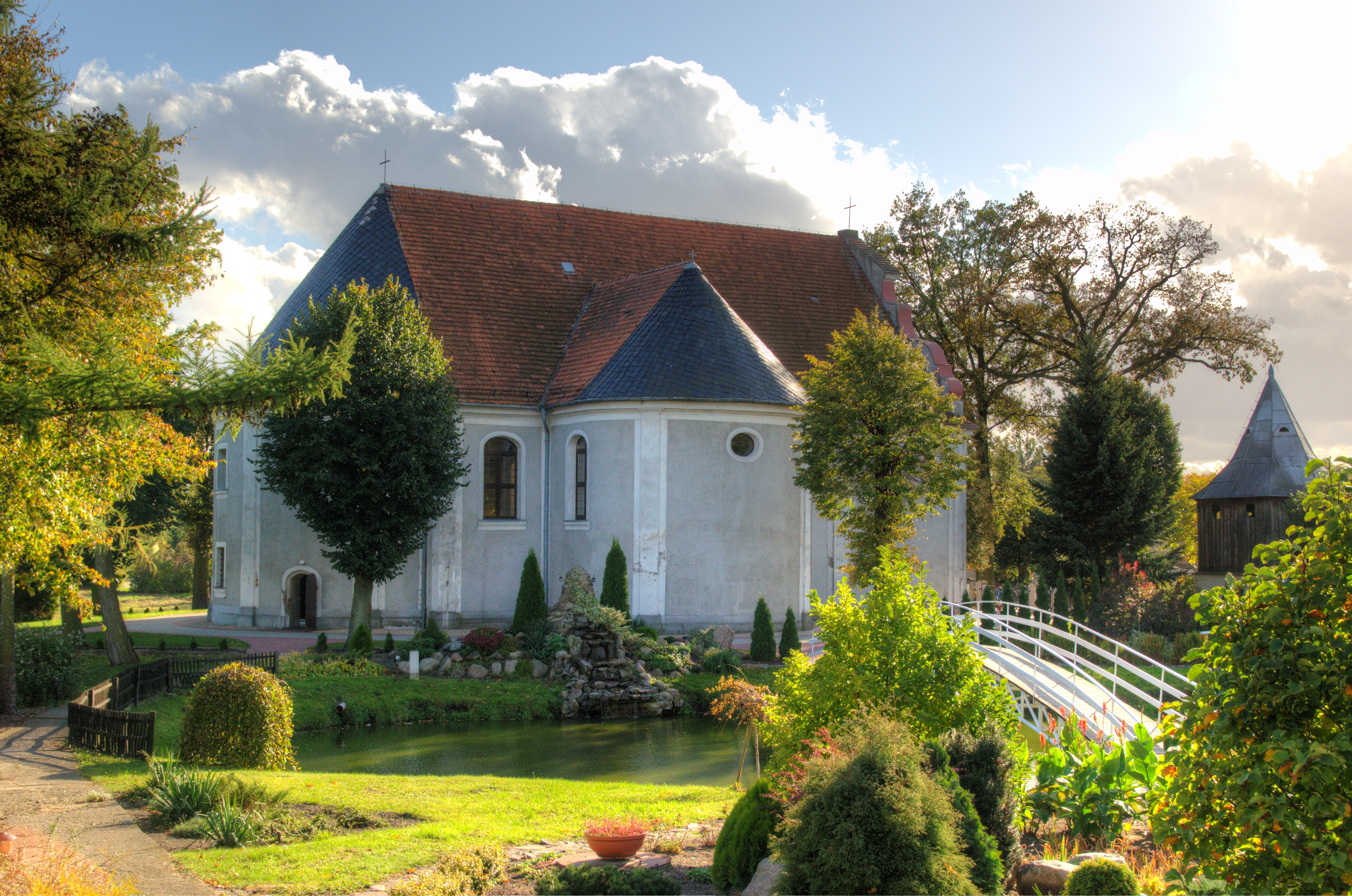 Wytomyśl, kościół p.w. św. Michała Archanioła, kon. XVIII w.